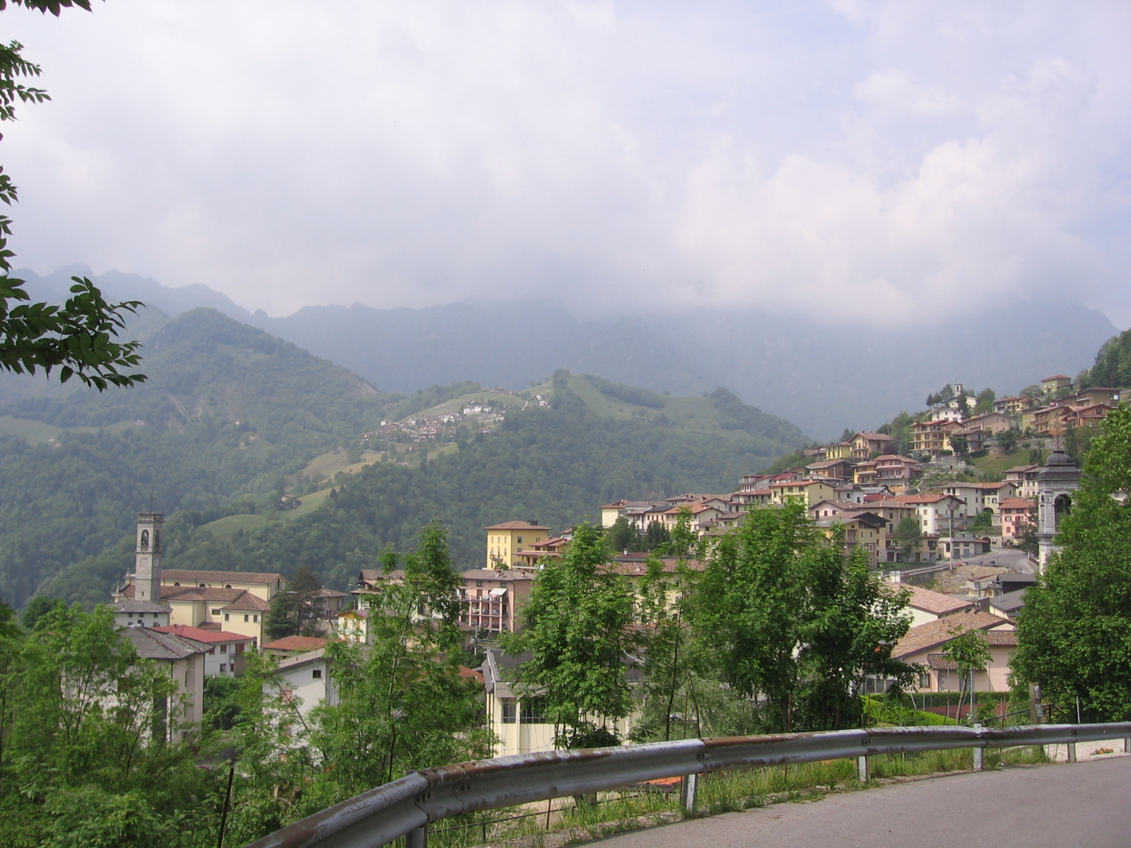 Gorno, Bergamo, Italia